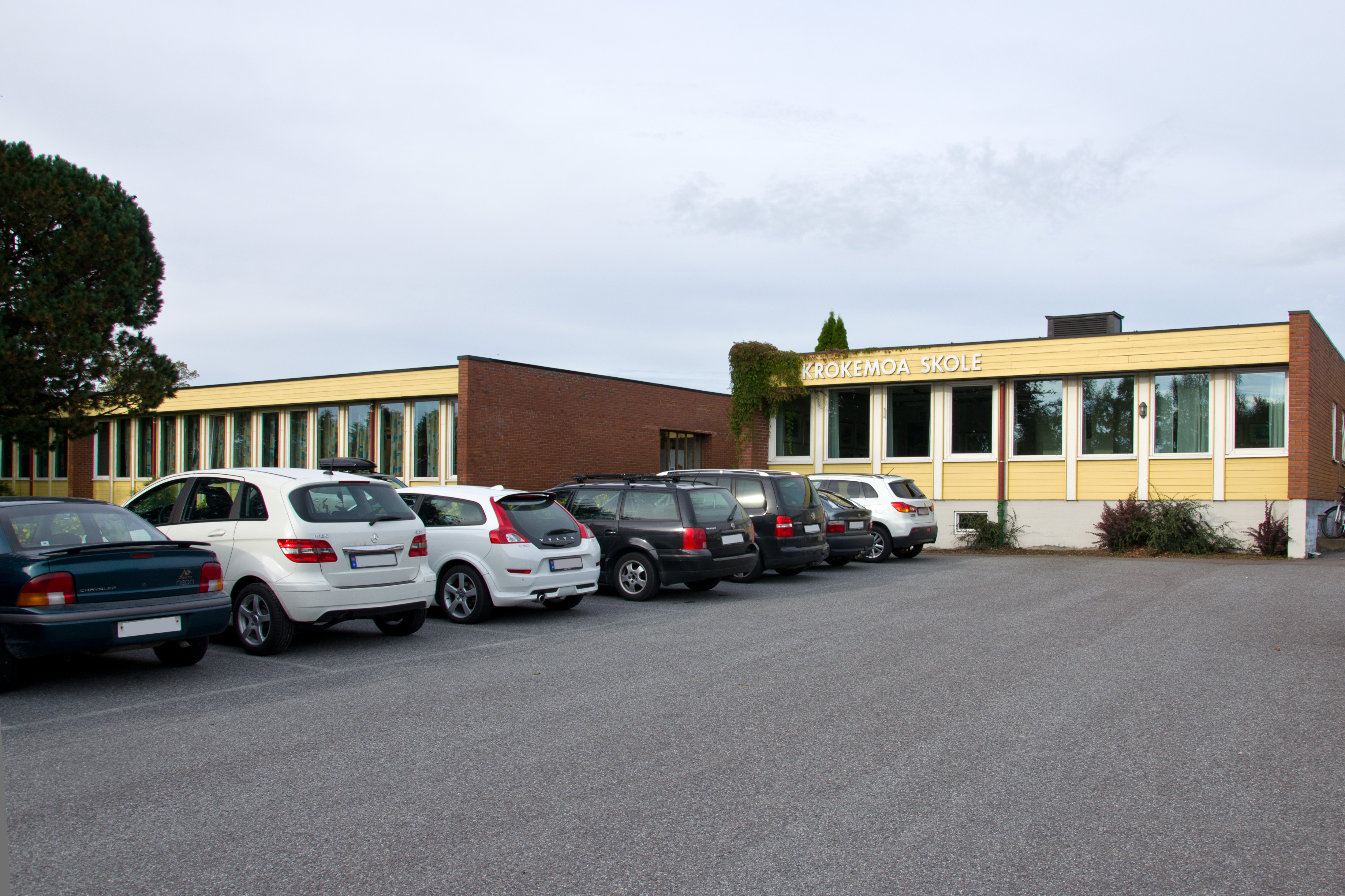 Krokemoa skole i Sandefjord